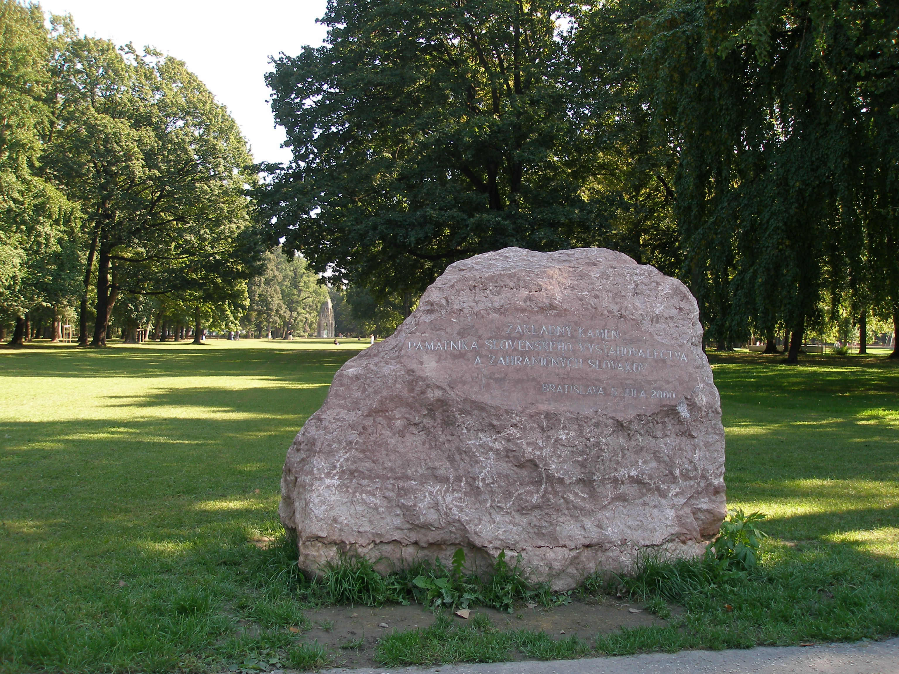 Sad Janka Kráľa